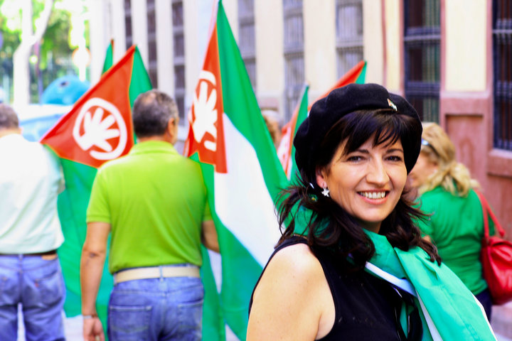 La secretaria general del Partido Andalucista y candidata a la Alcaldía de Sevilla, Pilar González Modino.